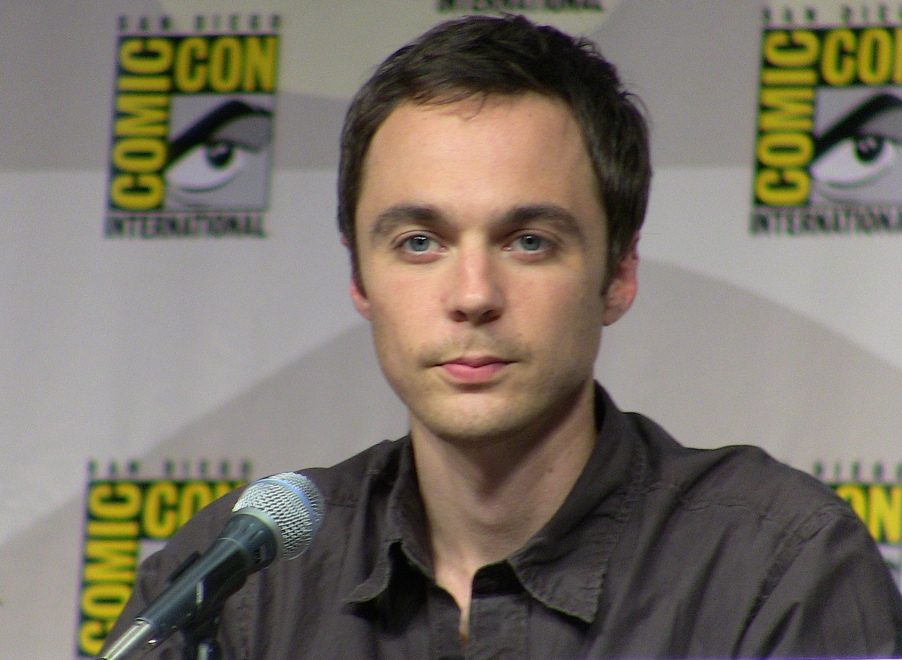 Jim Parsons na Comic Con 2009